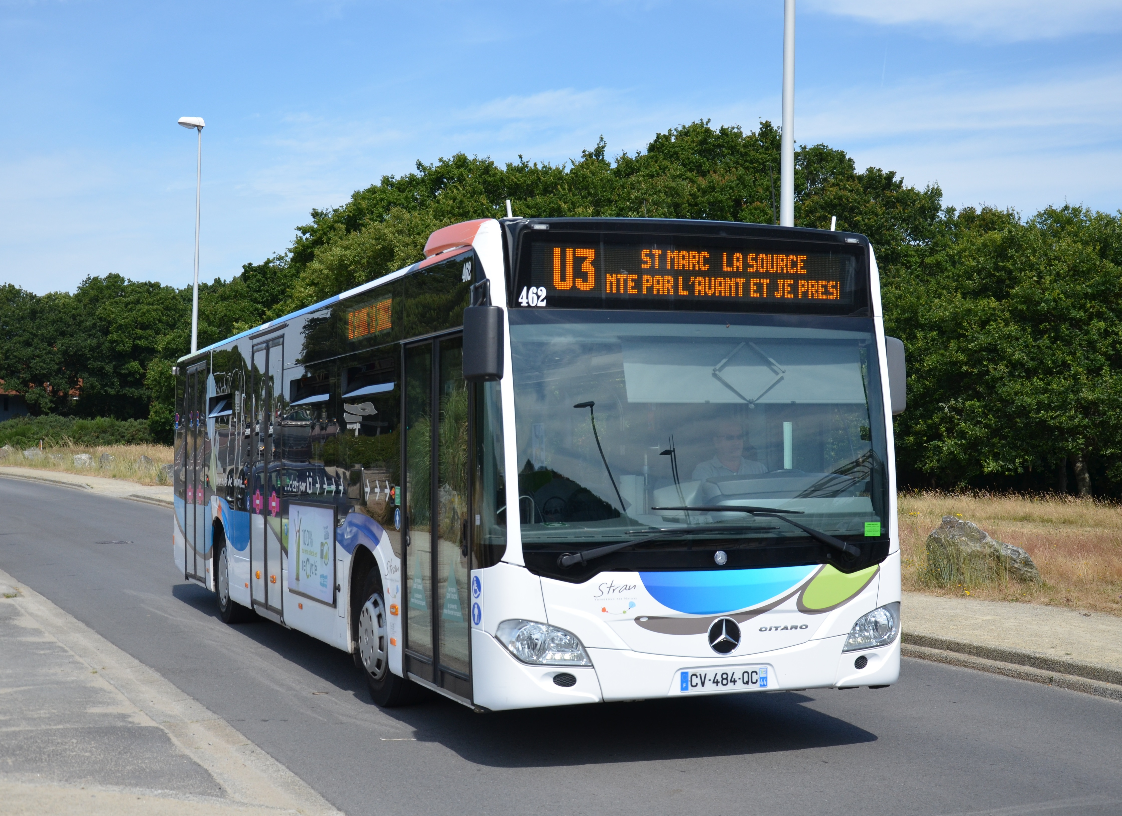 Mercedes Citaro C2 n°462 près du terminus Université, sur la ligne U3 du réseau STRAN de Saint-Nazaire.